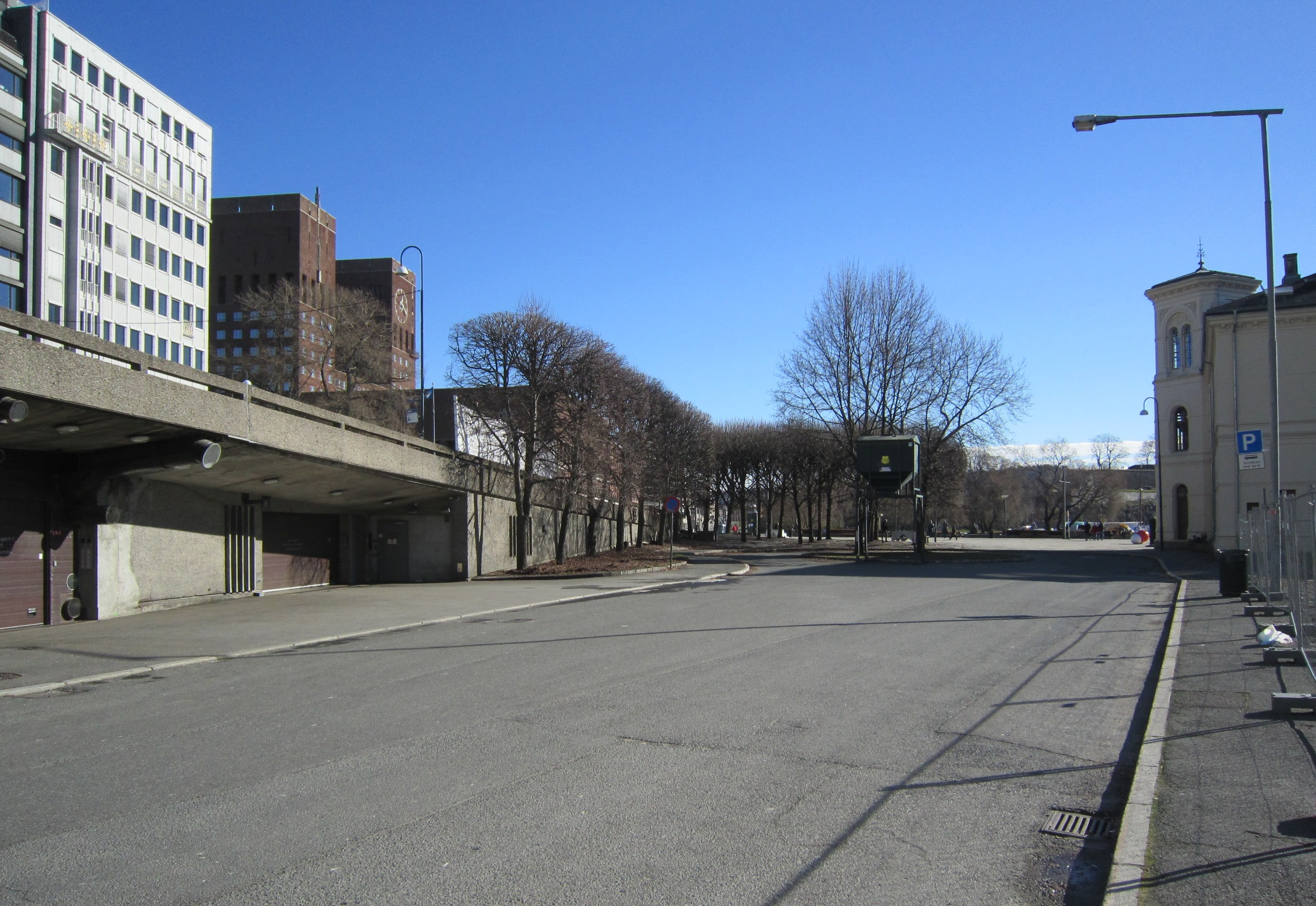 Enga ved Vestbanen